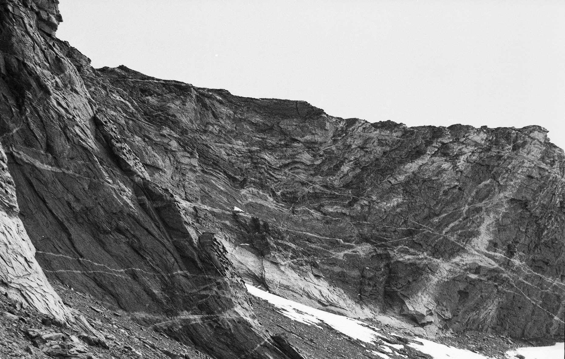 Gefaltete Abfolge von Gneisen im nördlichen Conradgebirge. Wandhöhe ca. 100 m, Blick nach Nordwesten auf die Ostflanke des Gebirges.